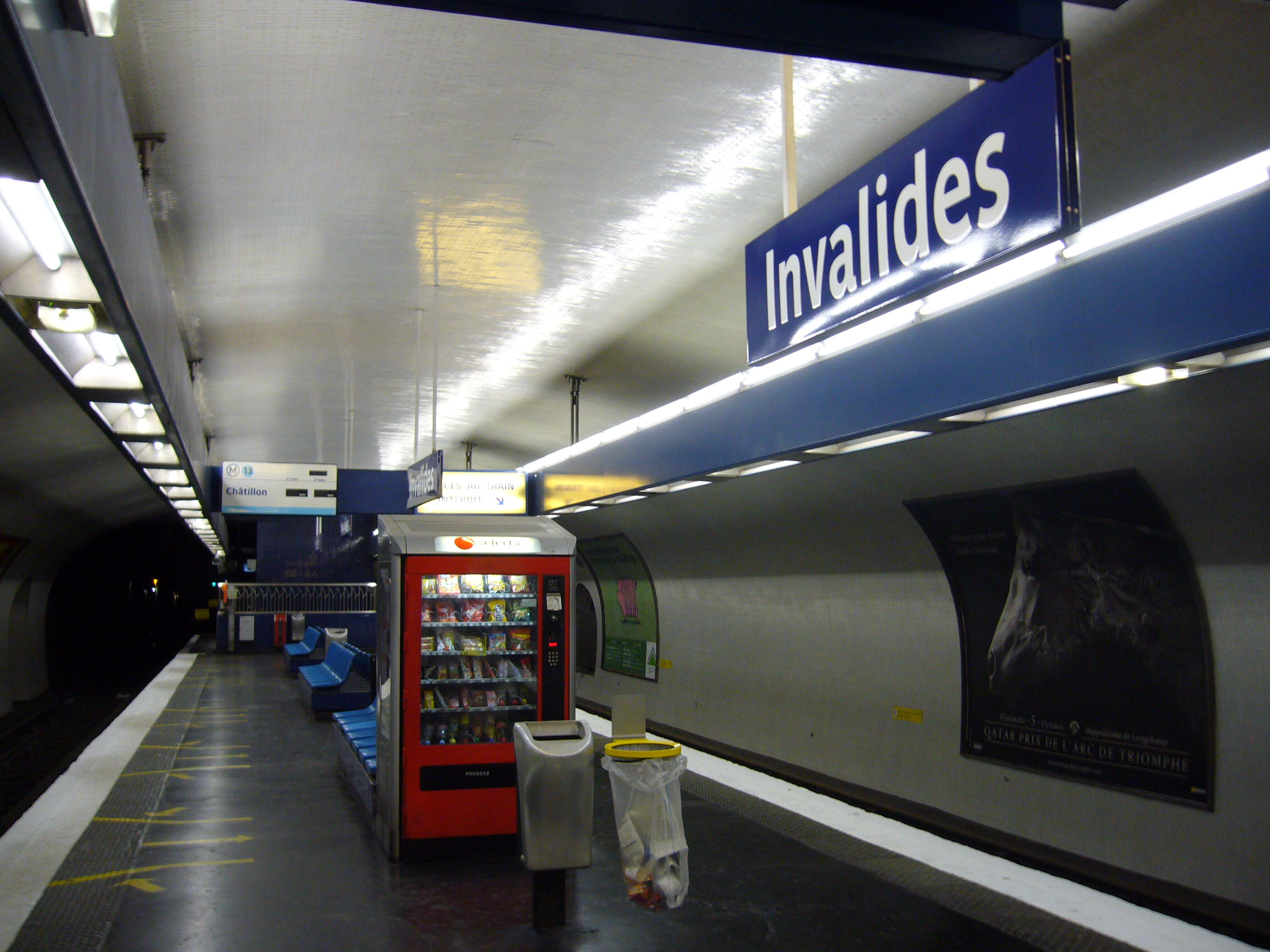 Vue de la station Invalides sur la ligne 13 du métro de Paris.